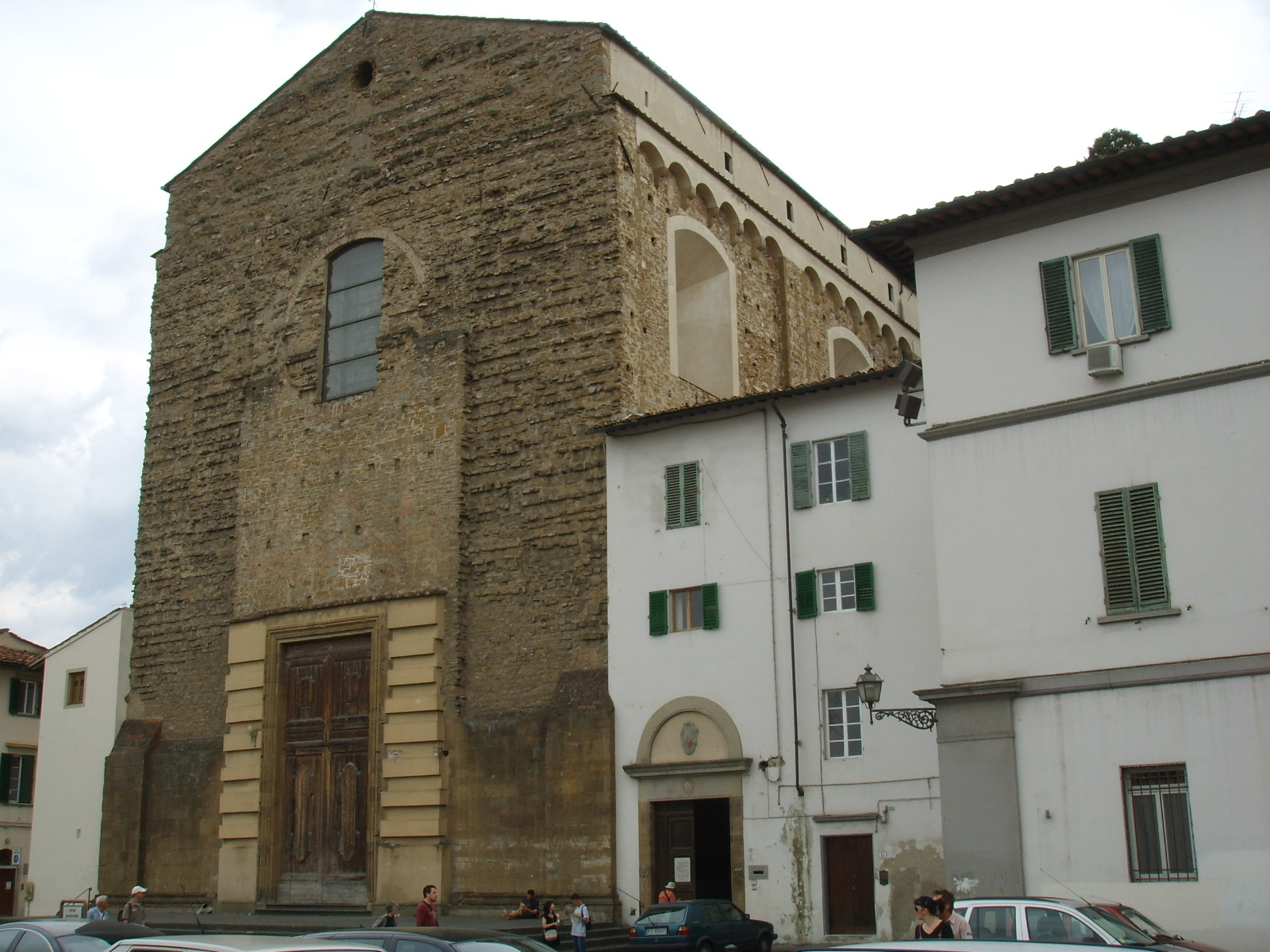 Santa Maria del Carmine church, Florence, Italy